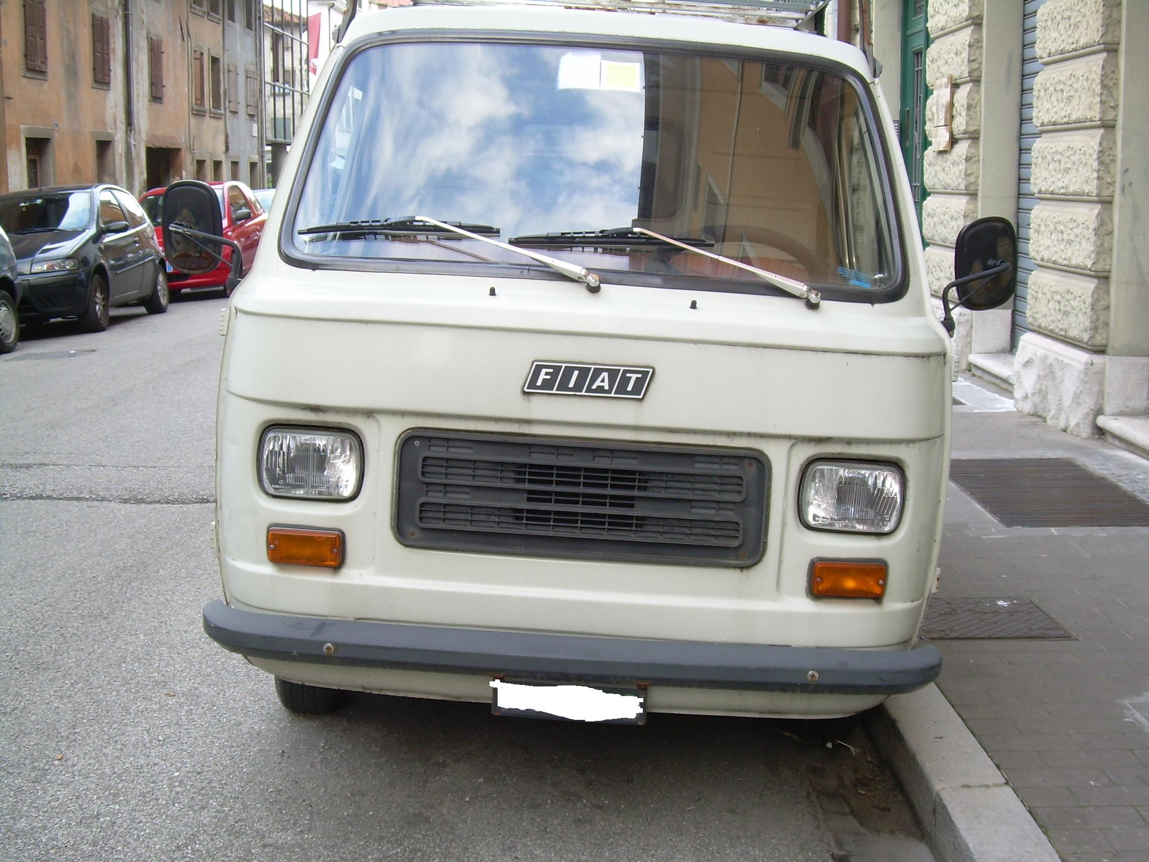 Autore:Powering Licenza: Descrizione:Frontale di un 900T seconda serie